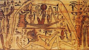 Древнеегипетские боги Геб и Нут изображённые на папирусе, фотография либо скан